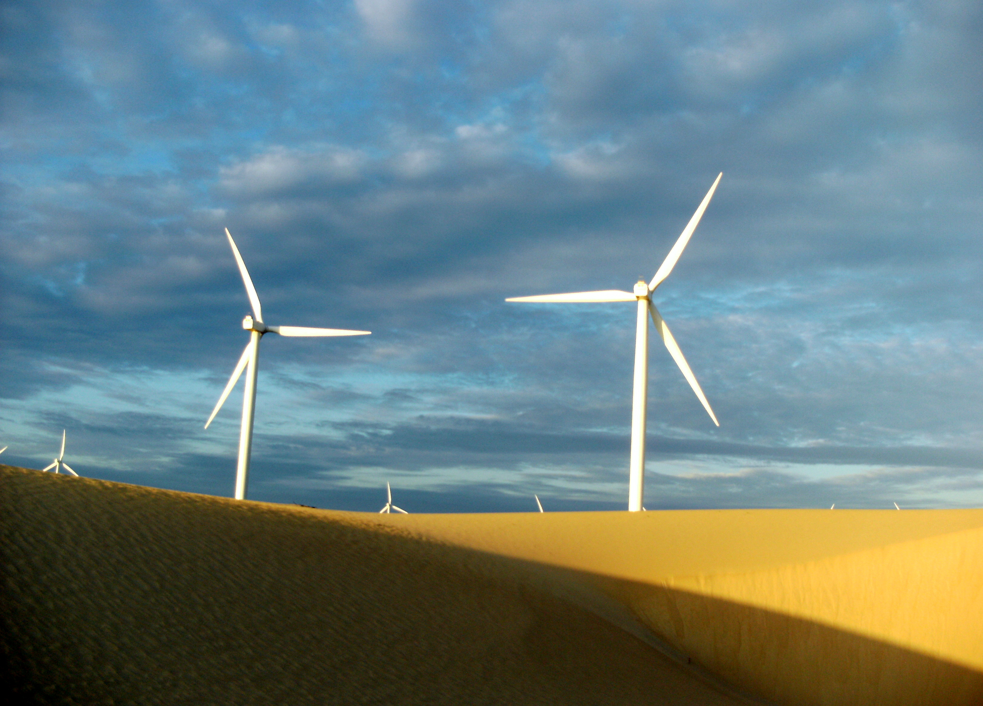 Eolienne sur les dunes d'Icarai, Brésil